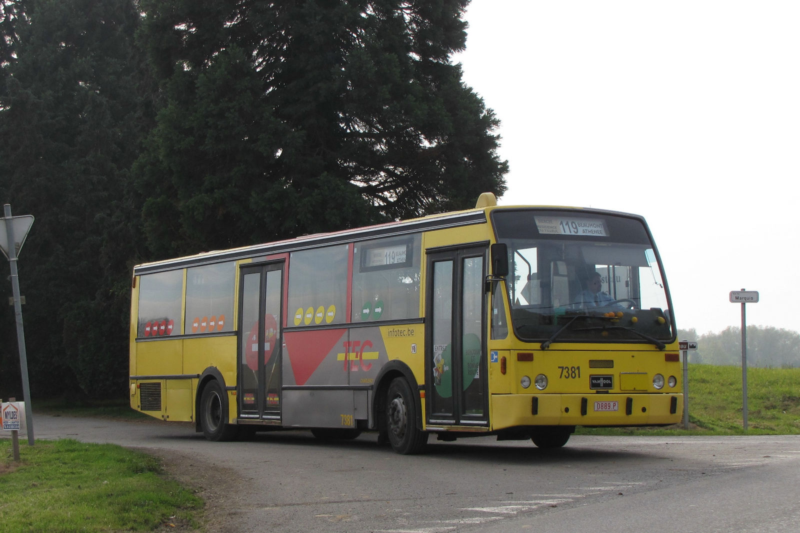 Le Van Hool A600/1 7383 du TEC Charleroi à Leers-et-Fosteau Tournebride en ligne 119.